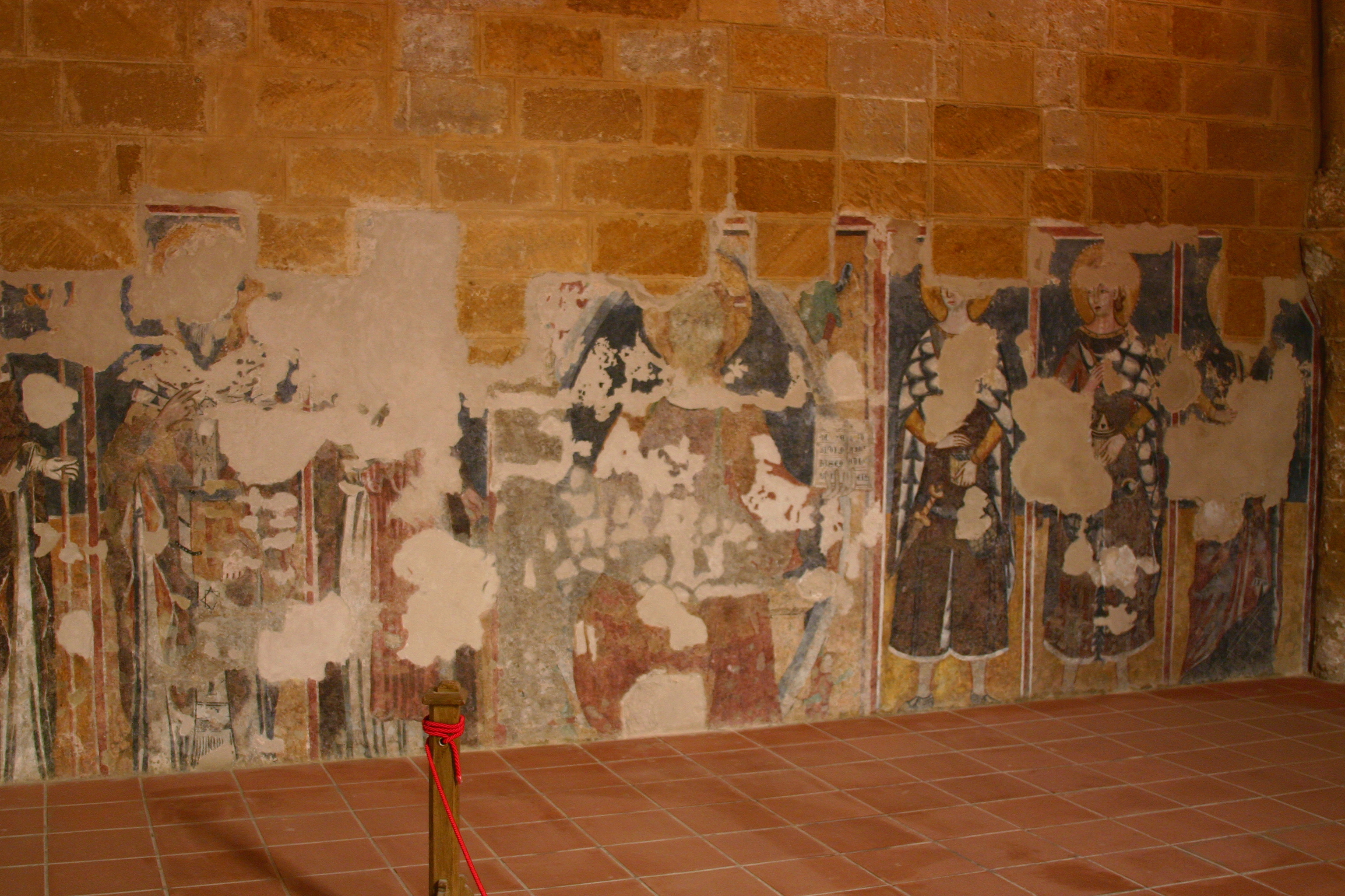 Monastery of Santo Spirito